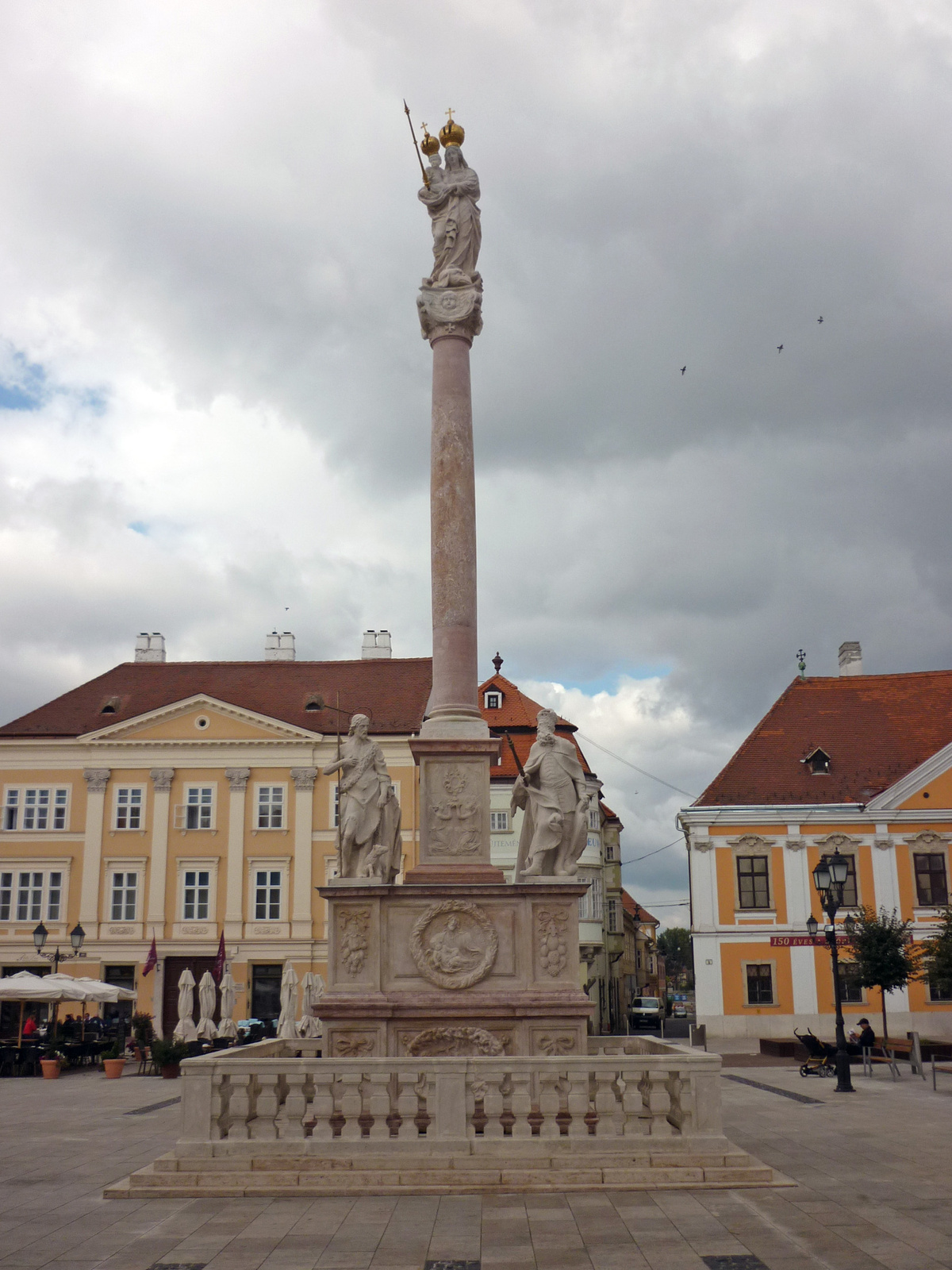 Mária oszlop (Győr, Széchenyi István tér) This is a photo of a monument in Hungary. Identifier: 4387